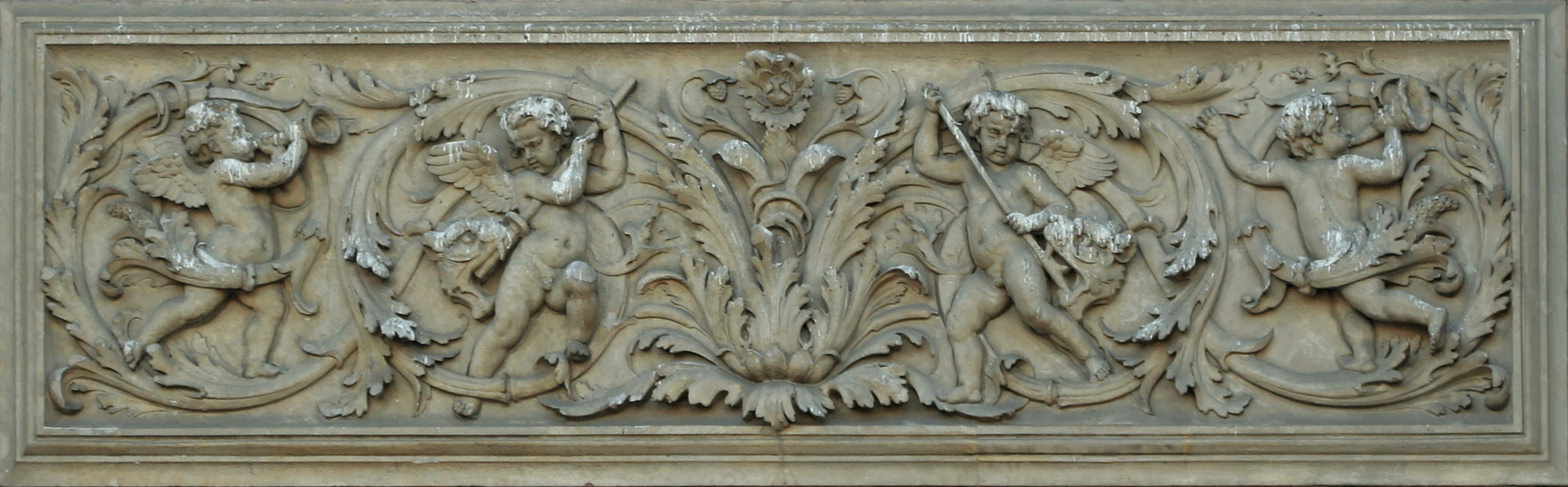 Marie-Noémi Cadiot, dite Claude Vignon, bas-relief ornemental, Paris, fontaine Saint-Michel.